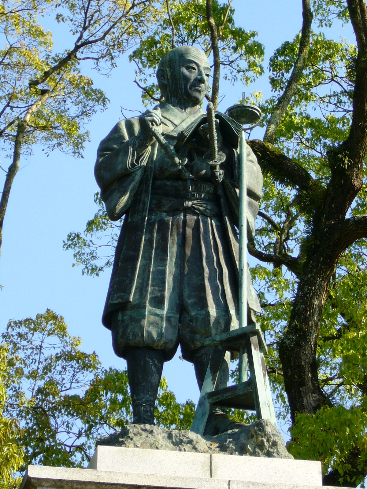 ino-tadataka,sawara,katori-city,japan